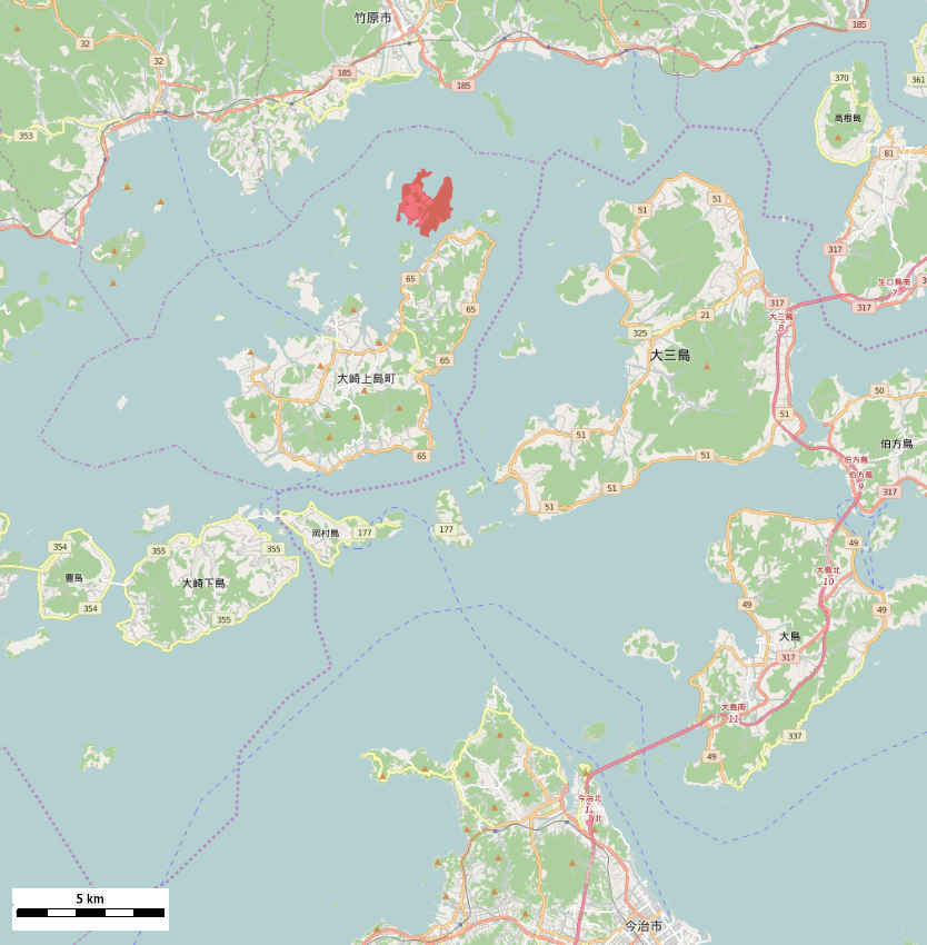 広島県大崎上島町の生野島周辺 This map may be incomplete, and may contain errors. Don't rely solely on it for navigation.